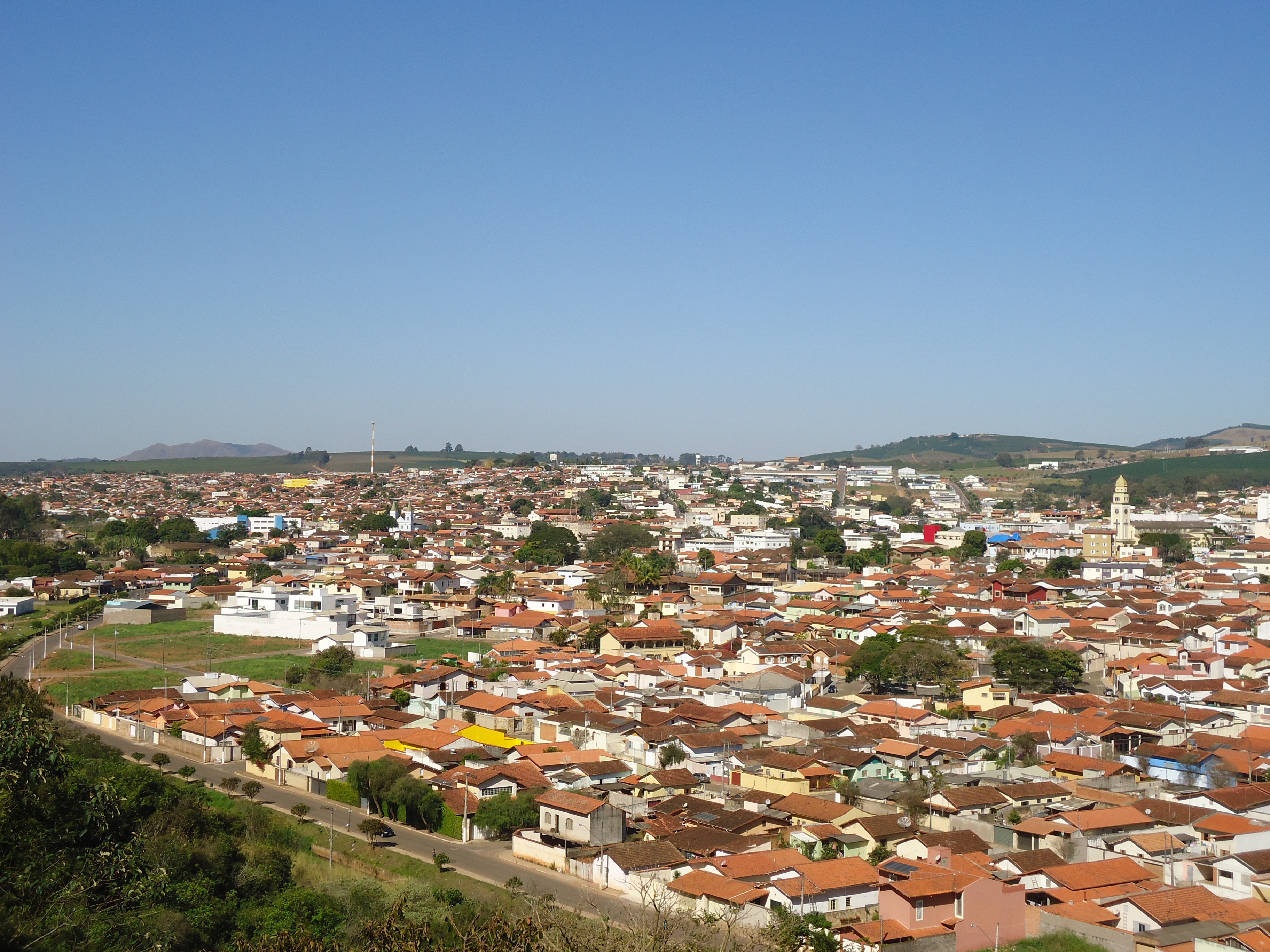 Vista de parte da zona urbana de Três Pontas. A direita pode-se ver a Igreja Matriz Nossa Senhora da Ajuda e à esquerda ao longe está a Serra de Três Pontas.